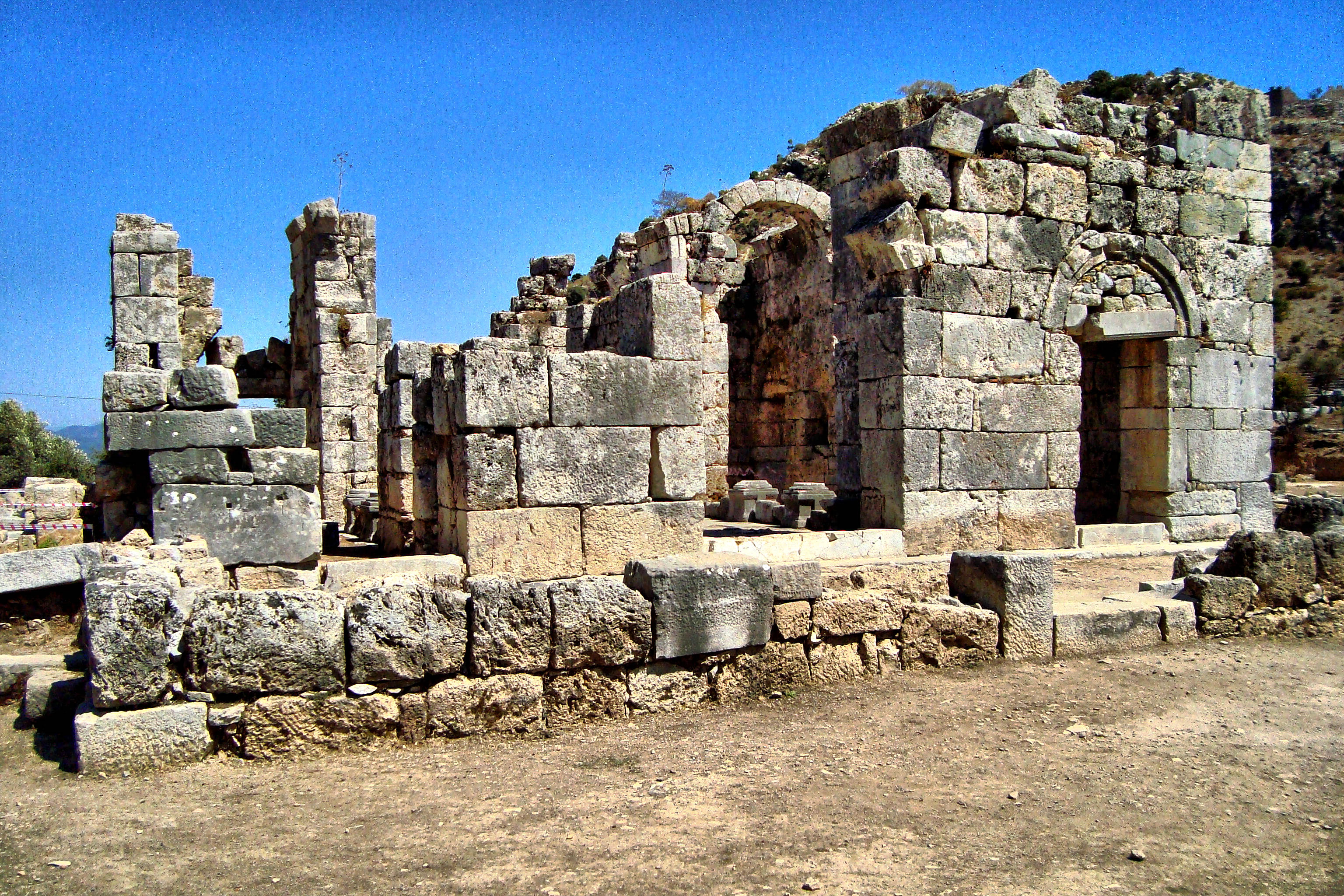 DALYAN-KAUNOS